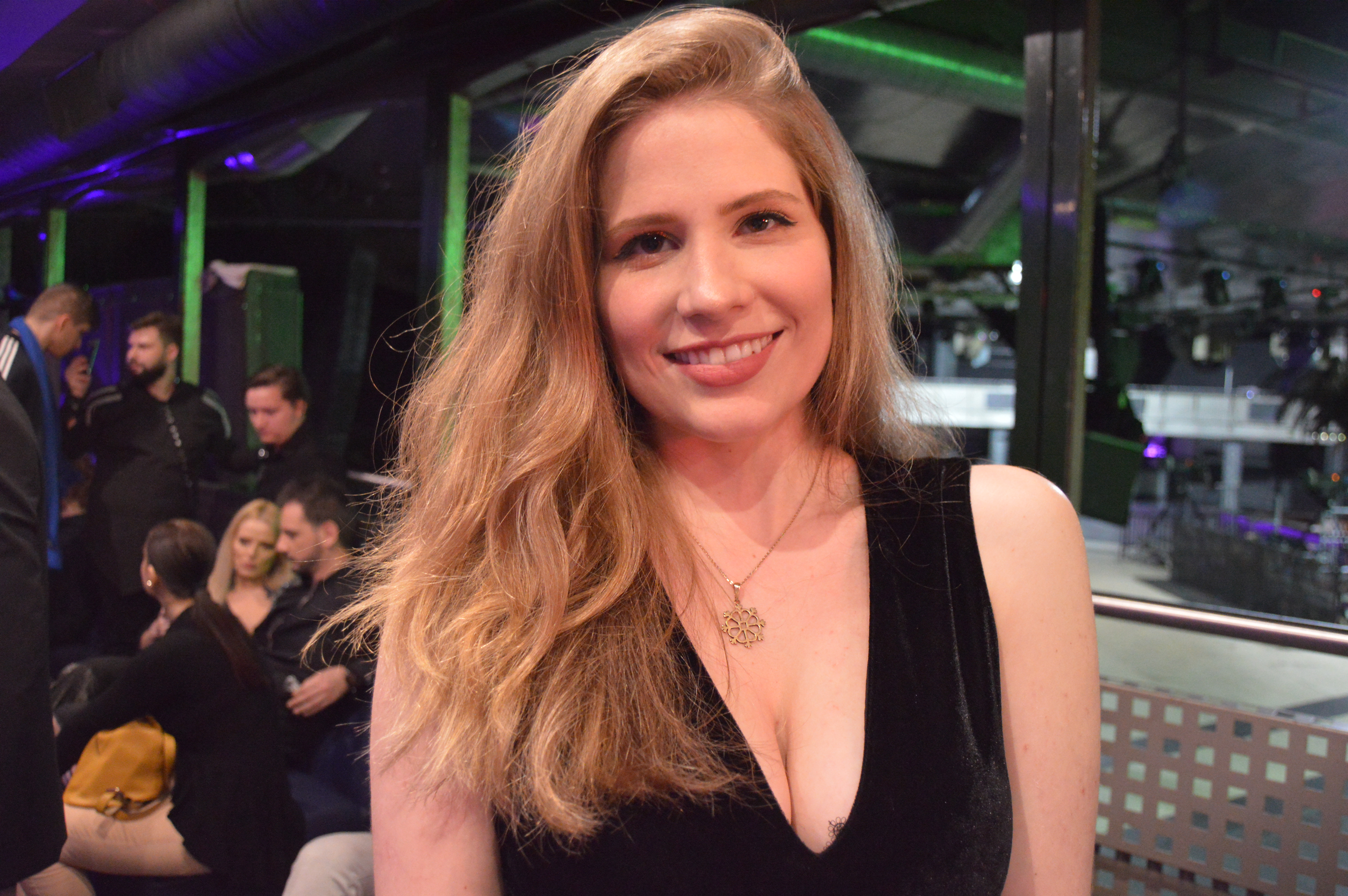 La cantante letona Laura Rizzotto en la Eurovision Spain PreParty en Madrid (Abril 2018)